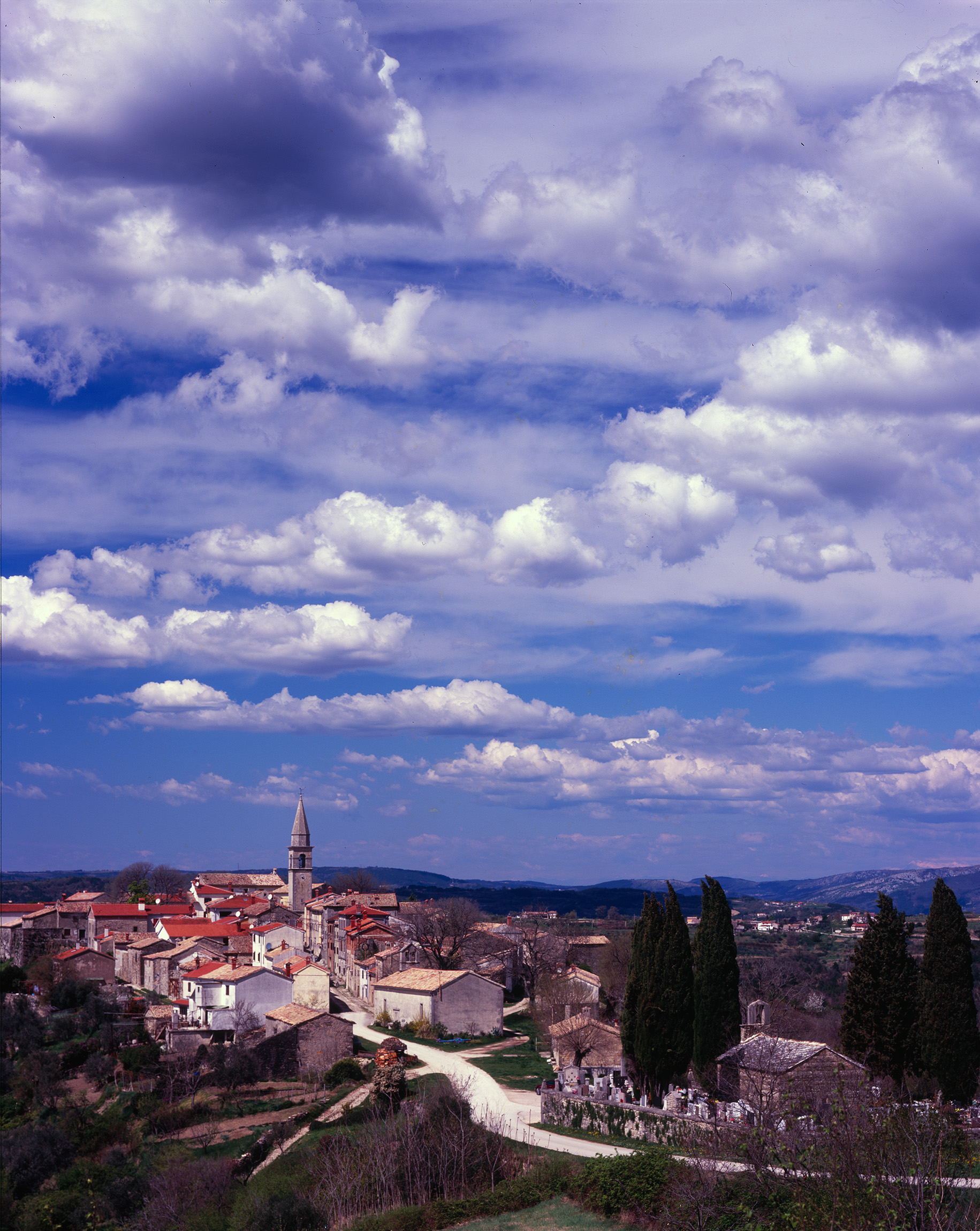 Kulturno - povijesna cjelina naselja Draguć, RRI-0048-1962.